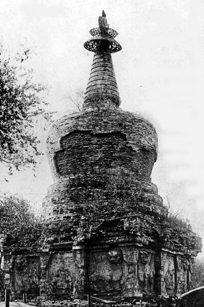 中文（中国大陆）: 沈阳市西塔旧景